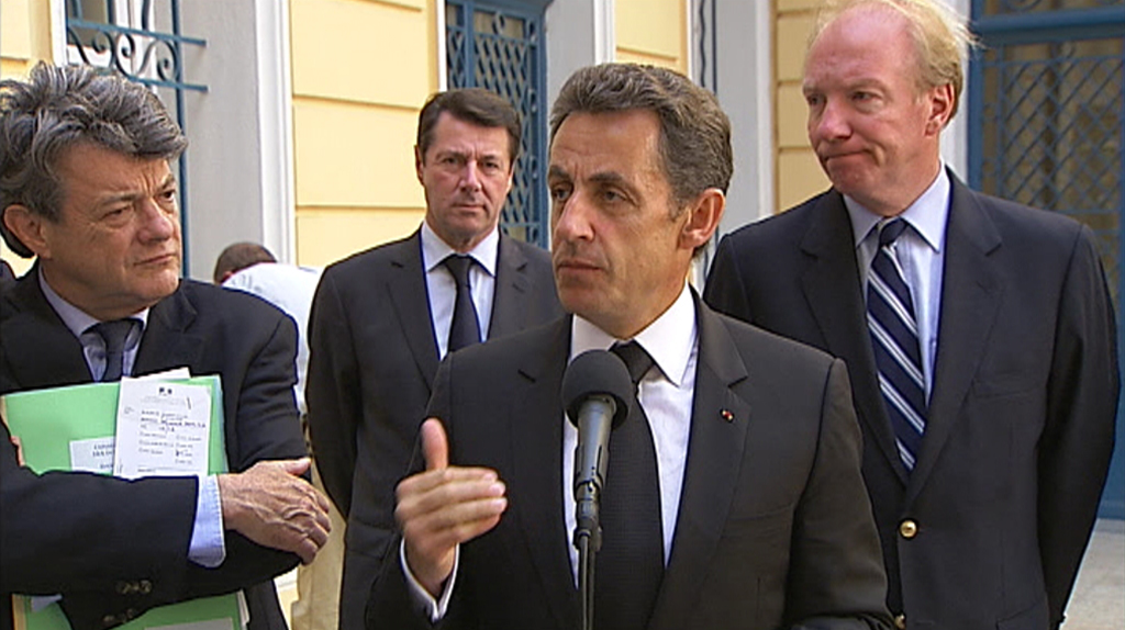 Nicolas Sarkozy se déplace dans le Var pour témoigner aux Varois de la solidarité nationale.